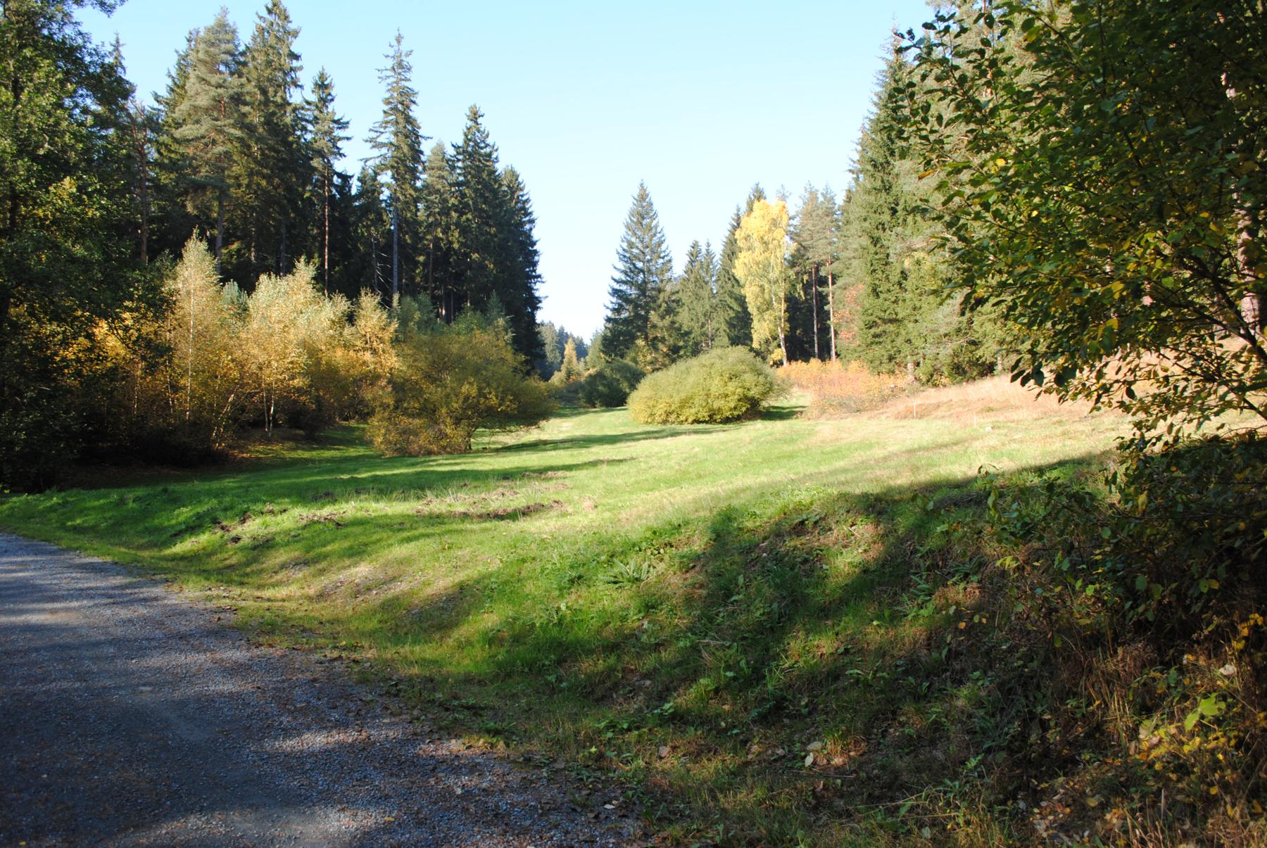 Zeidelweidetal in Adorf im Vogtland, Blick vom Weg ab